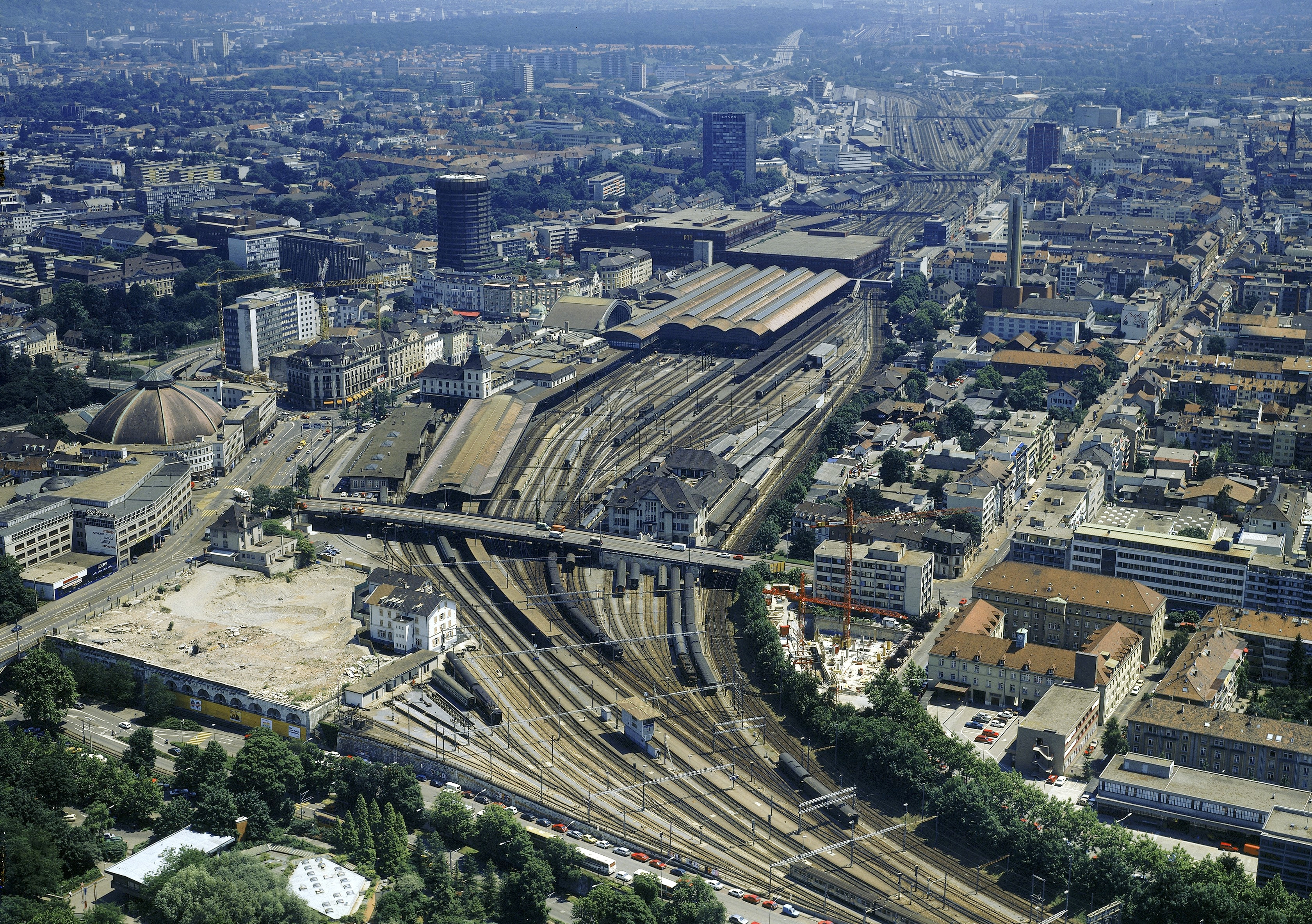 Basel Luftbild des Bahnhof SBB mit BIZ-Turm, Lonza-Hochhaus und Coop-Hochhaus